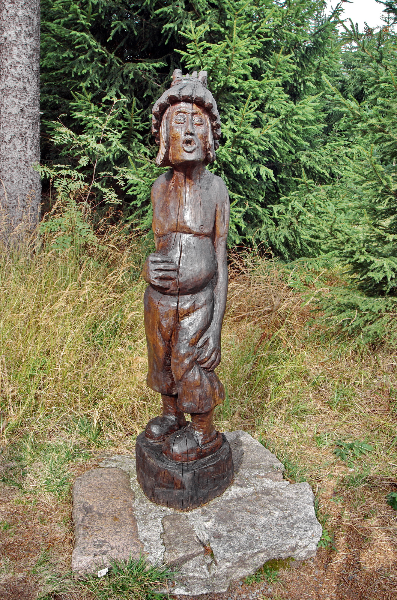 Plešivec, Krušné hory, Stezka krušnohorských pověstí - Hejkal Hejma, okres Karlovy Vary